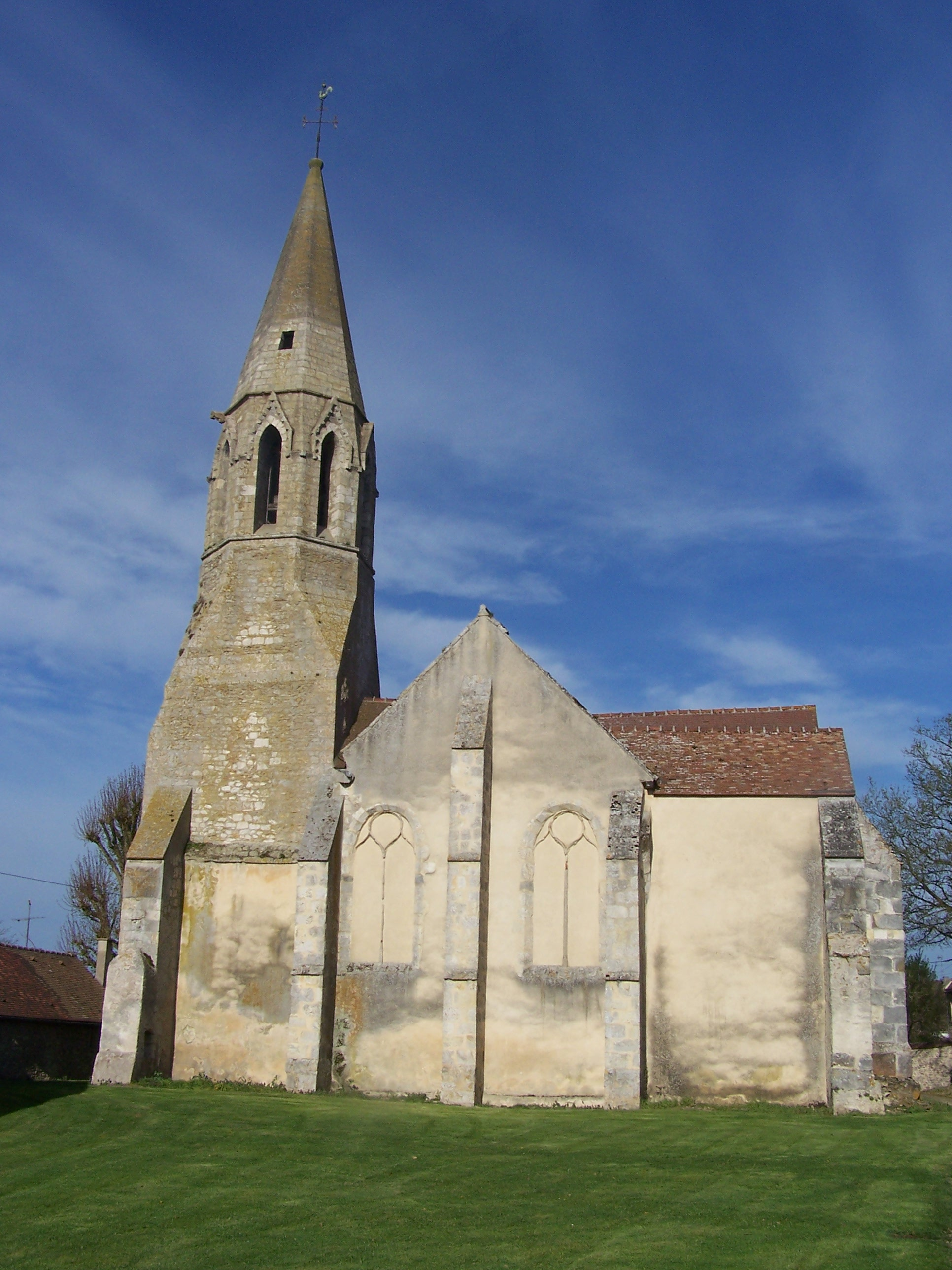 Église de Prunay-en-Yvelines, Yvelines, France